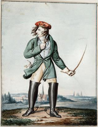 Student Telschow in ganzer Figur vor Landschaft Aquarell, 20,0 x 15,5 cm Bezeichnet u. r.: jetziger advocate Telschow als Student gezeichnet von Suhrlandt. Inv. Nr. 970 Hz, Staatliches Museum Schwerin. Anmerkung: Christian Wilhelm Conrad Telschow, Advocat und Bürgermeister in Warin (* 12. Juni 1798; † 16. September 1874), 5. März 1816 imm. Rostock (Matrikelportal)